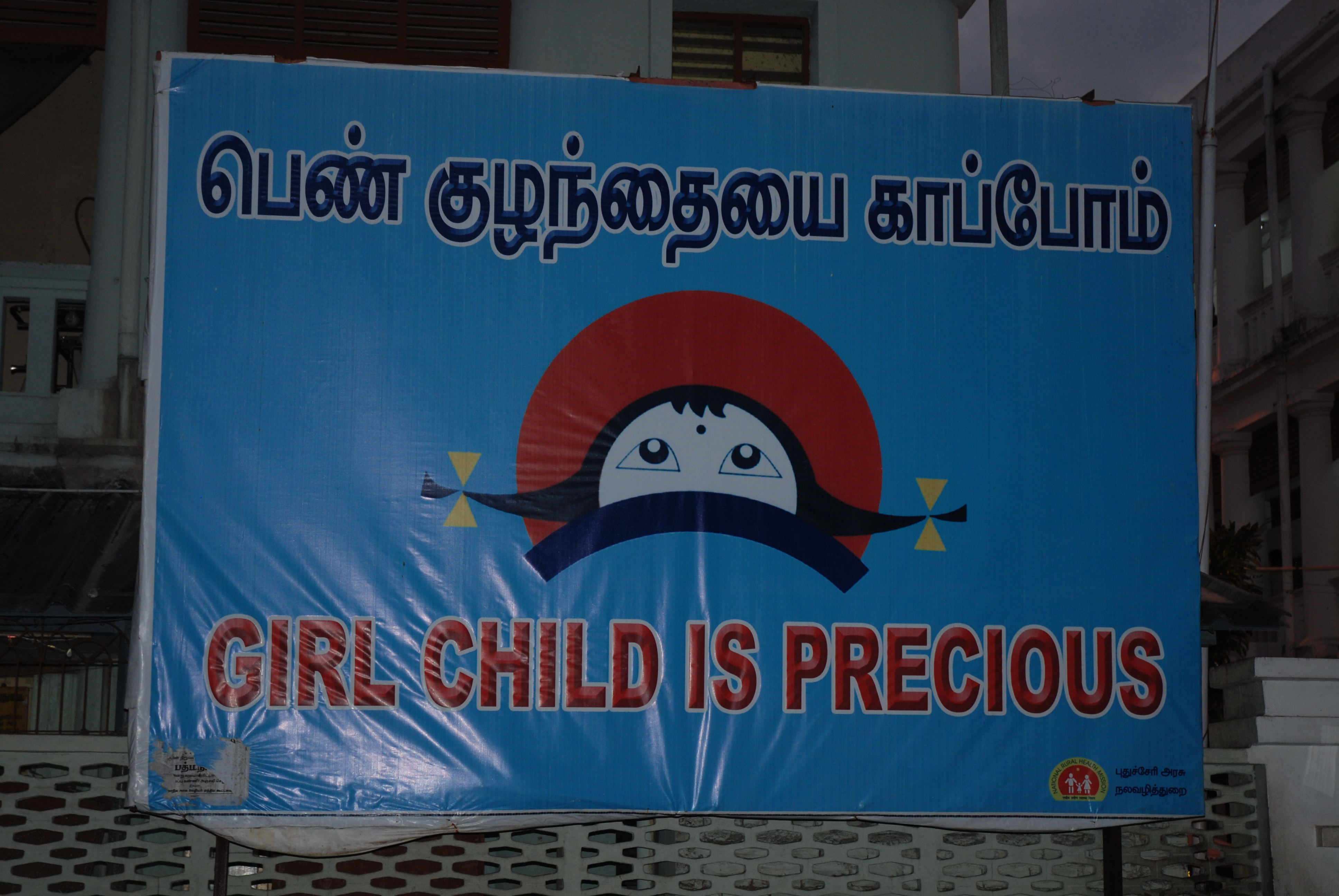 Panneau bilingue Tamoul-Anglais à Pondichery - Protection des enfants féminins